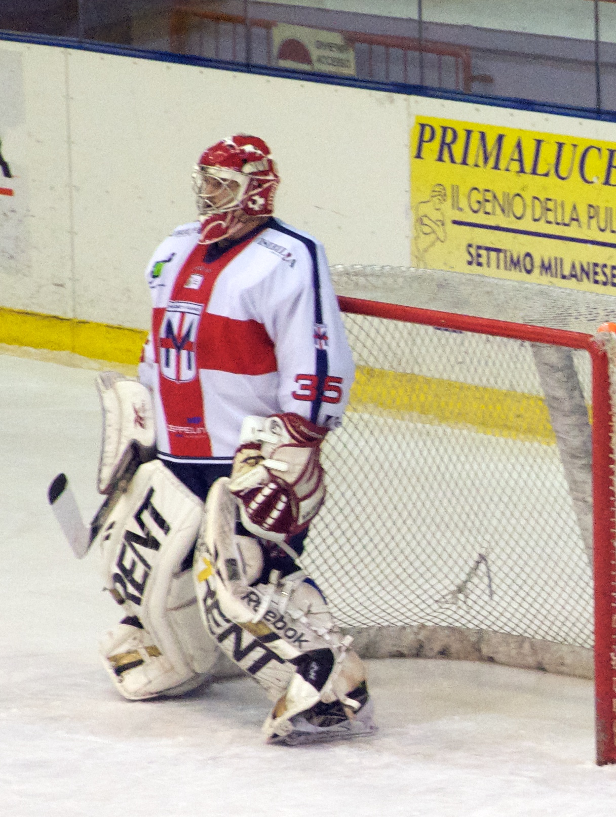 Milano Hockey non si ferma più in questi playoff!